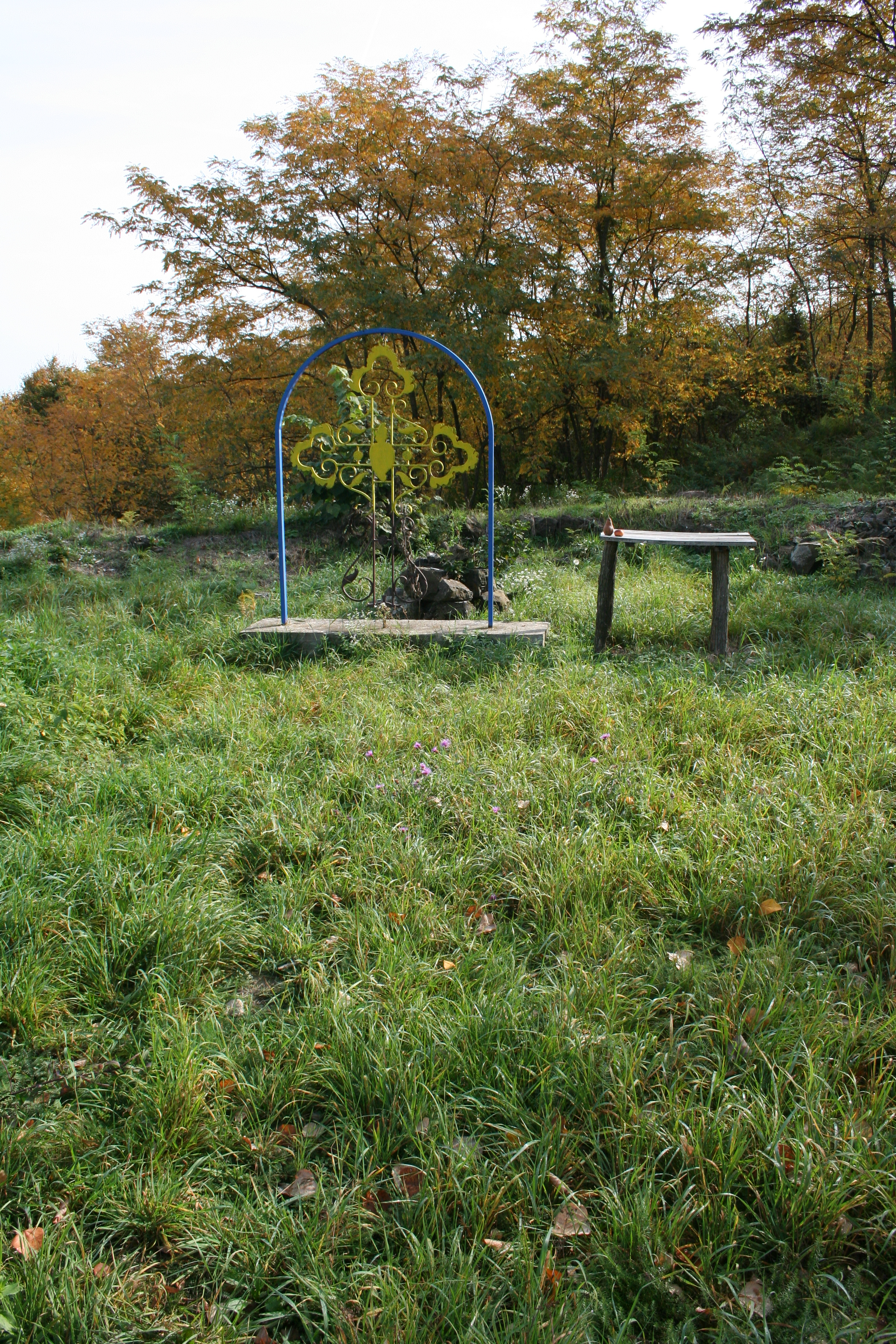 Ruševine manastira Grad (Gradojević)